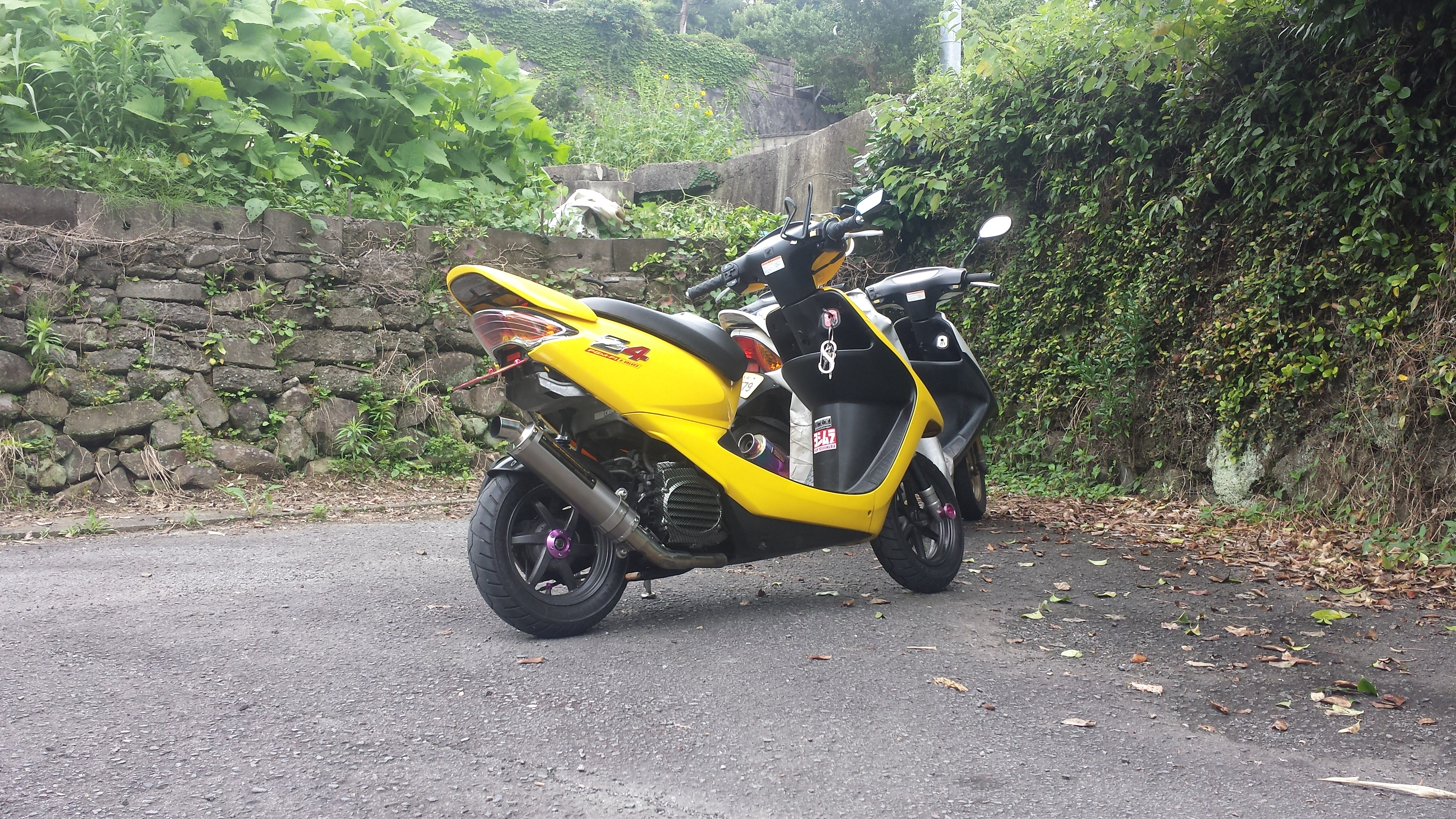 ディオの画像